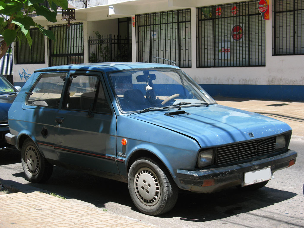 Yugo Koral 55 A 1.1 1989